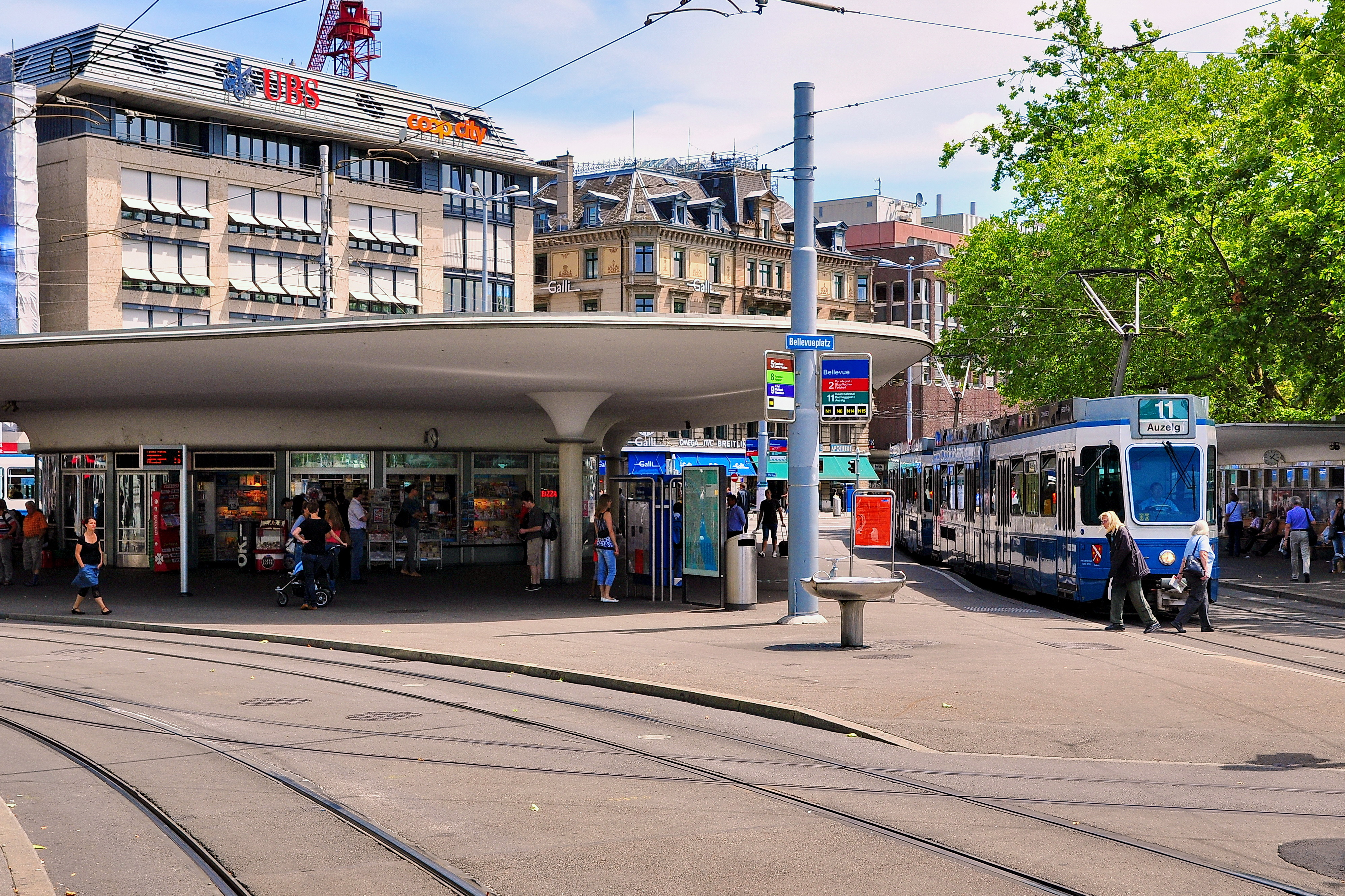 Bellevue in Zürich (Switzerland)